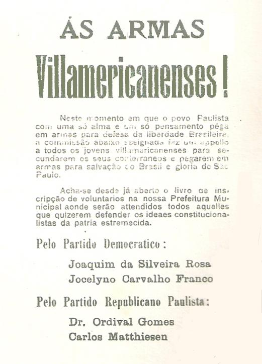 documento de convocação dos jovens de villa Americana para lutar na revolução de 1932